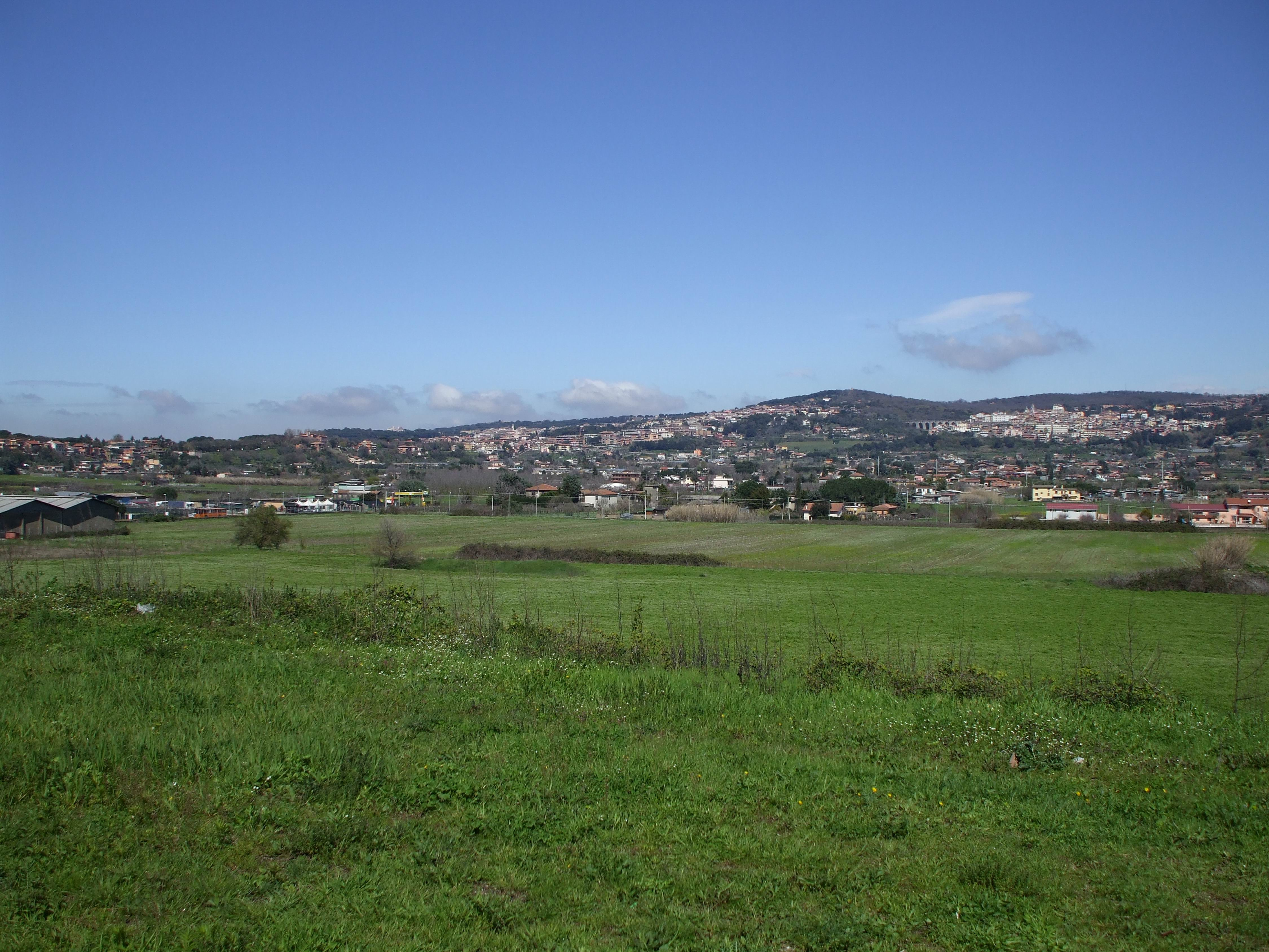 Vallericcia - Ariccia